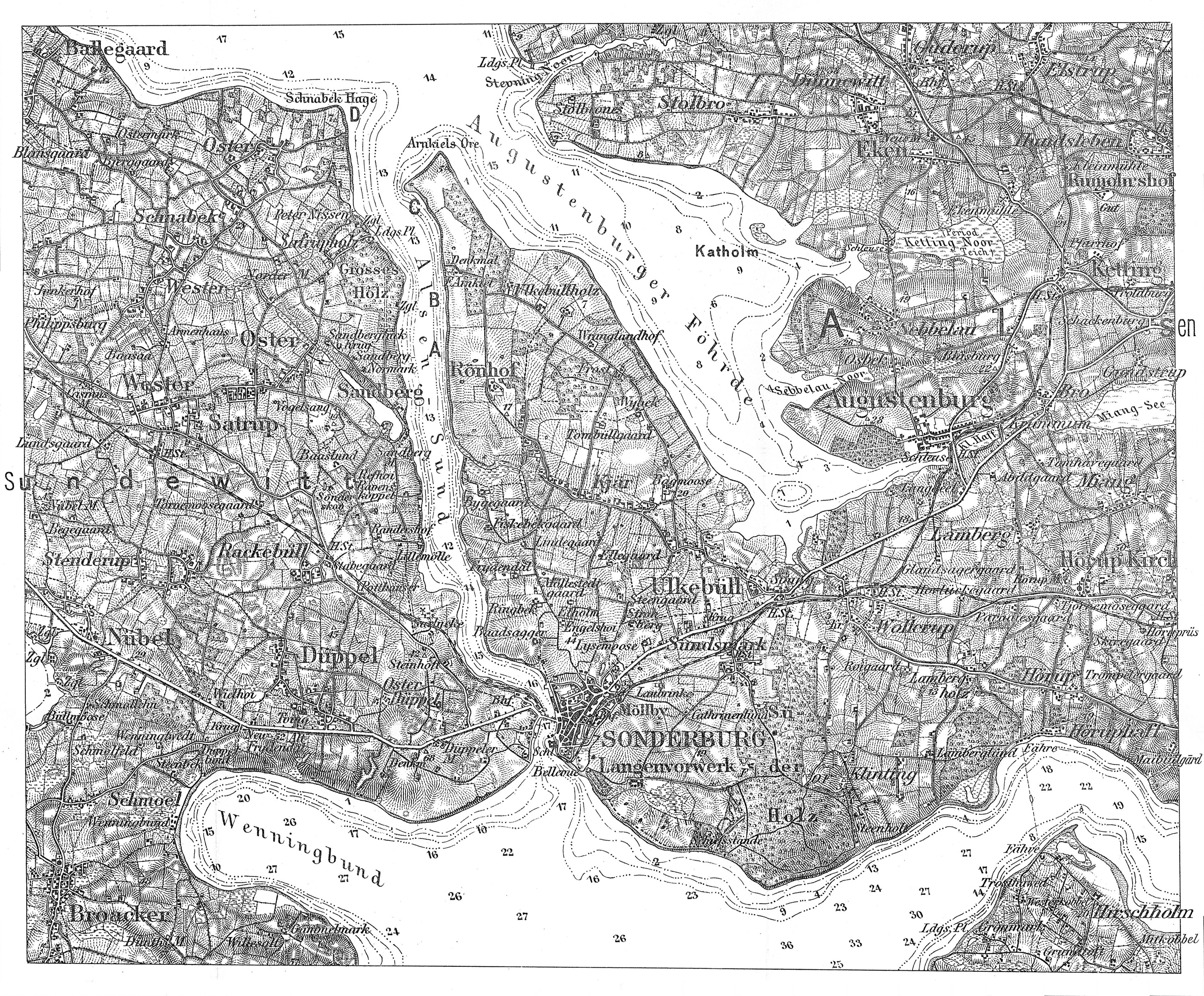 Detail aus der Skizze zum Deutsch-Dänischen Krieg 1864